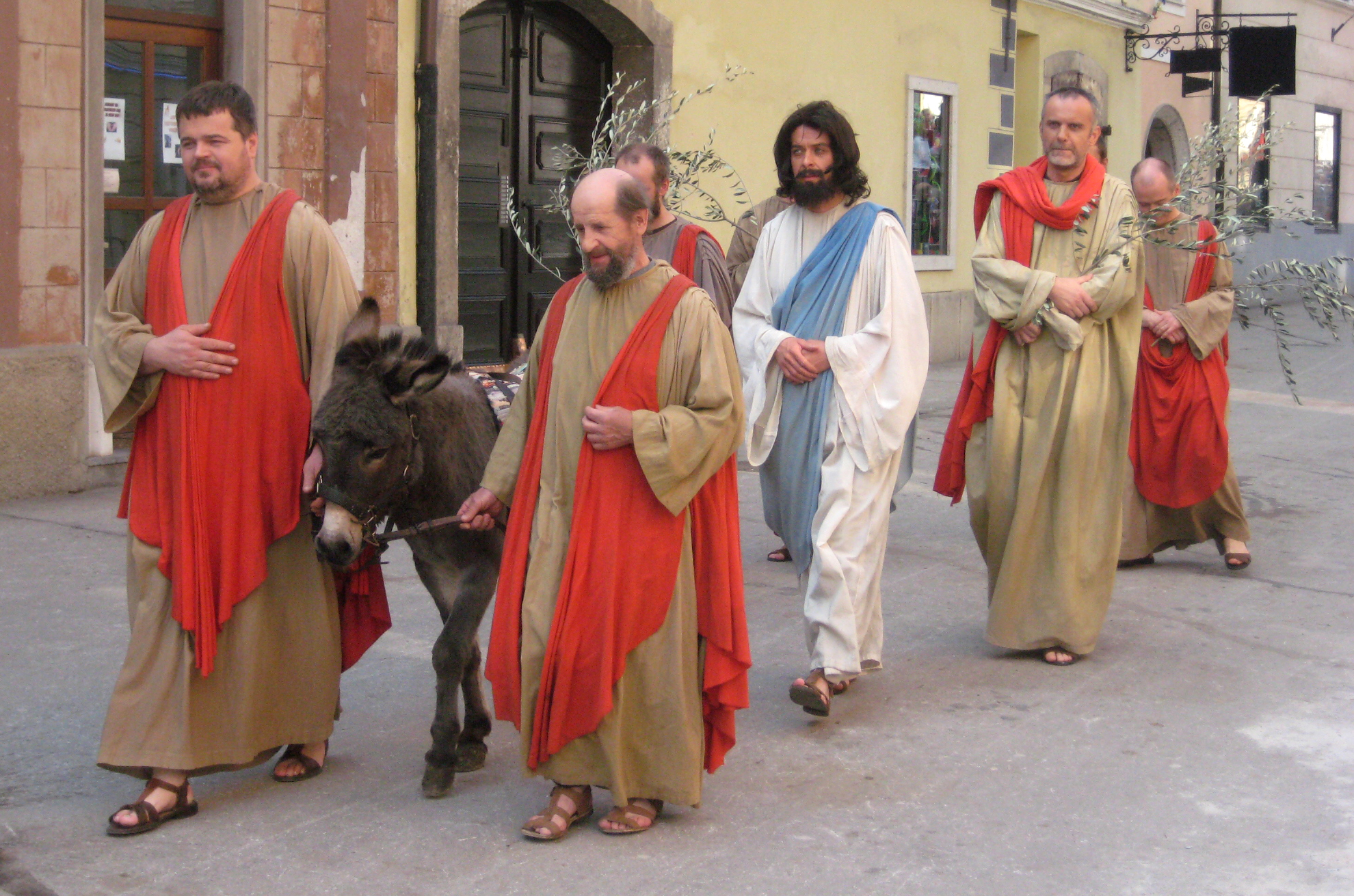 Škofjeloški pasijon (Processio Locopolitana), izvedba 2009 v Škofji Loki